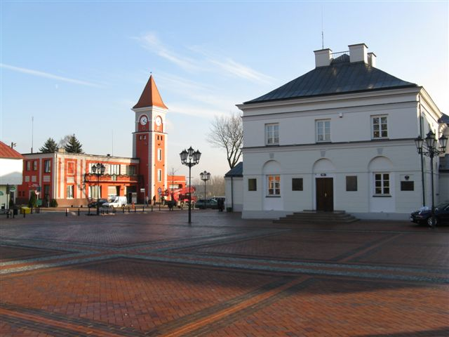 Warka, Plac hetmana Stefana Czarnieckiego 1 - ratusz z 1 poł. XIX w. (zabytek nr 488/A/62 oraz 202/A)